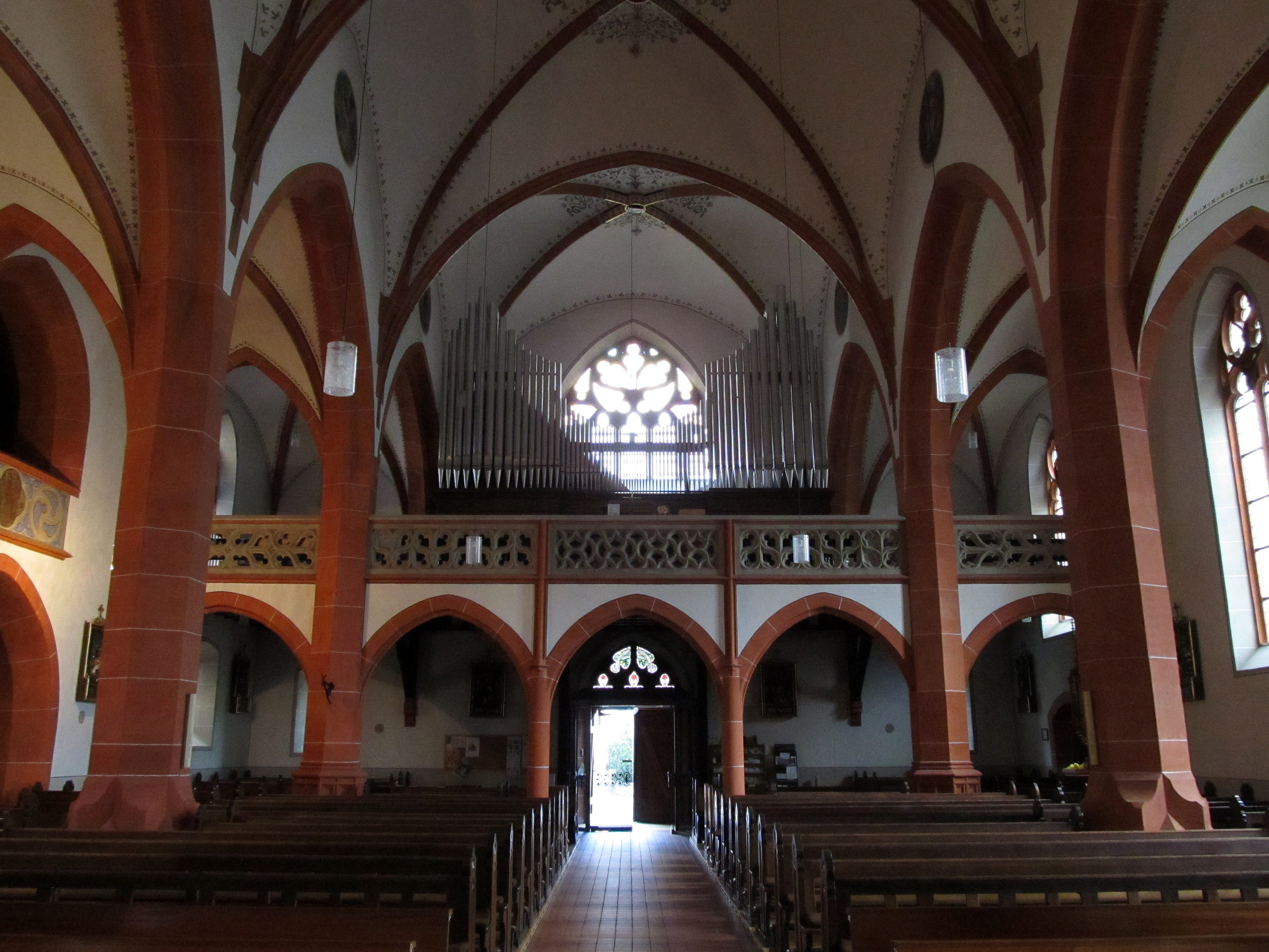 Blick ins Innere der katholischen Pfarrkirche St. Willibrord in Limbach, einem Ortsteil der Gemeinde Schmelz, Landkreis Saarlouis, Saarland